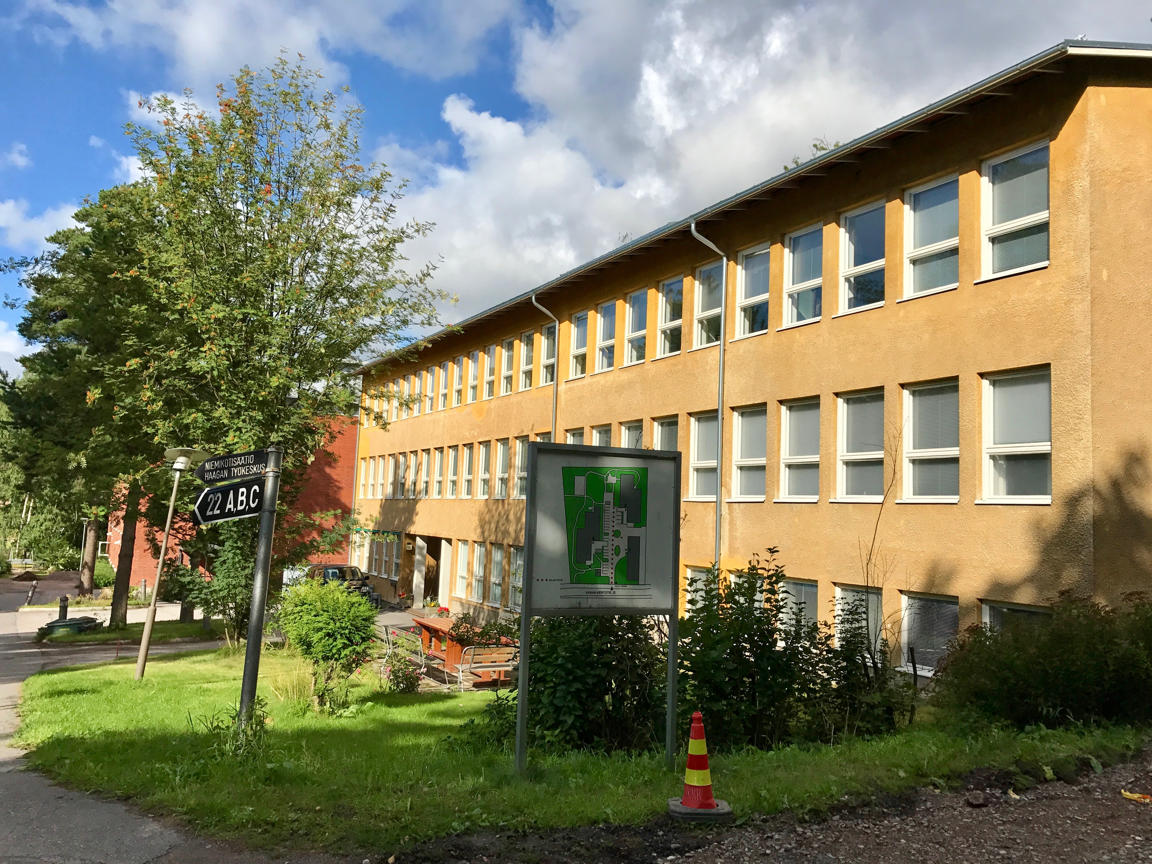 Niemikotisäätiön Haagan toimintatalo Helsingissä.